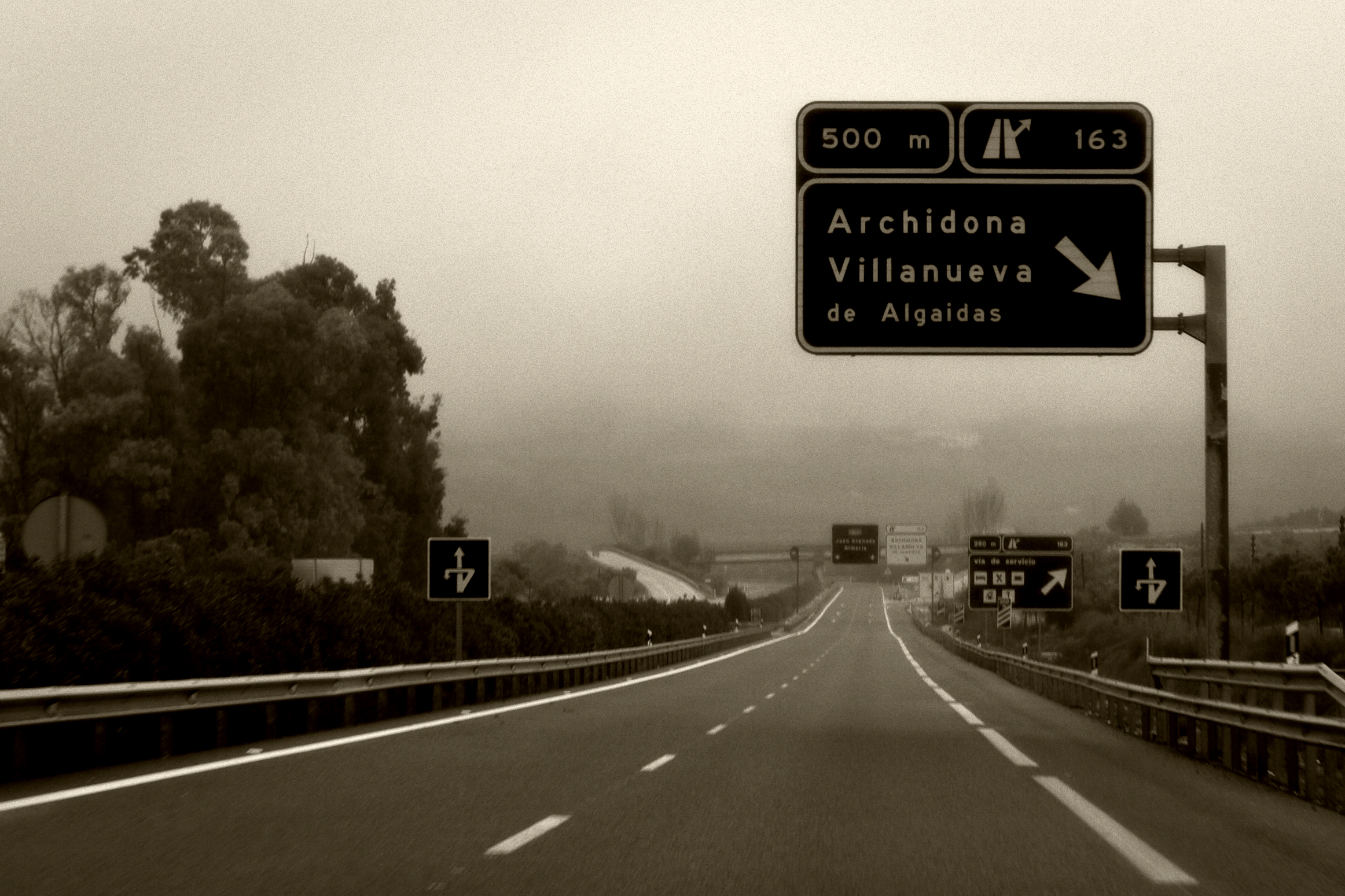 Archidona y Villanueva de Algaidas. Sitios bonicos.